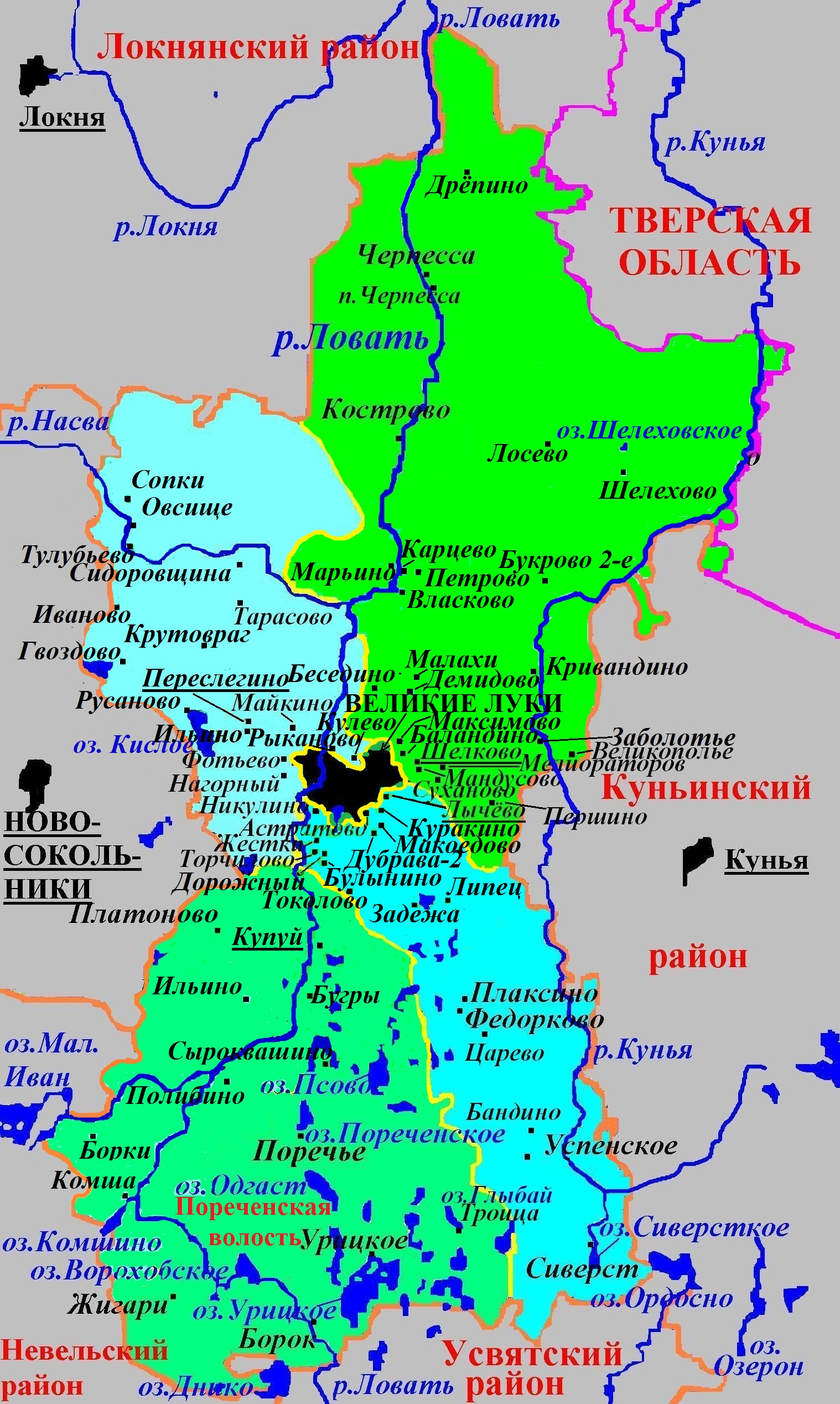 Административное деление Великолукского района по Закону Псковской области от 10 декабря 2014 года № 1465-ОЗ